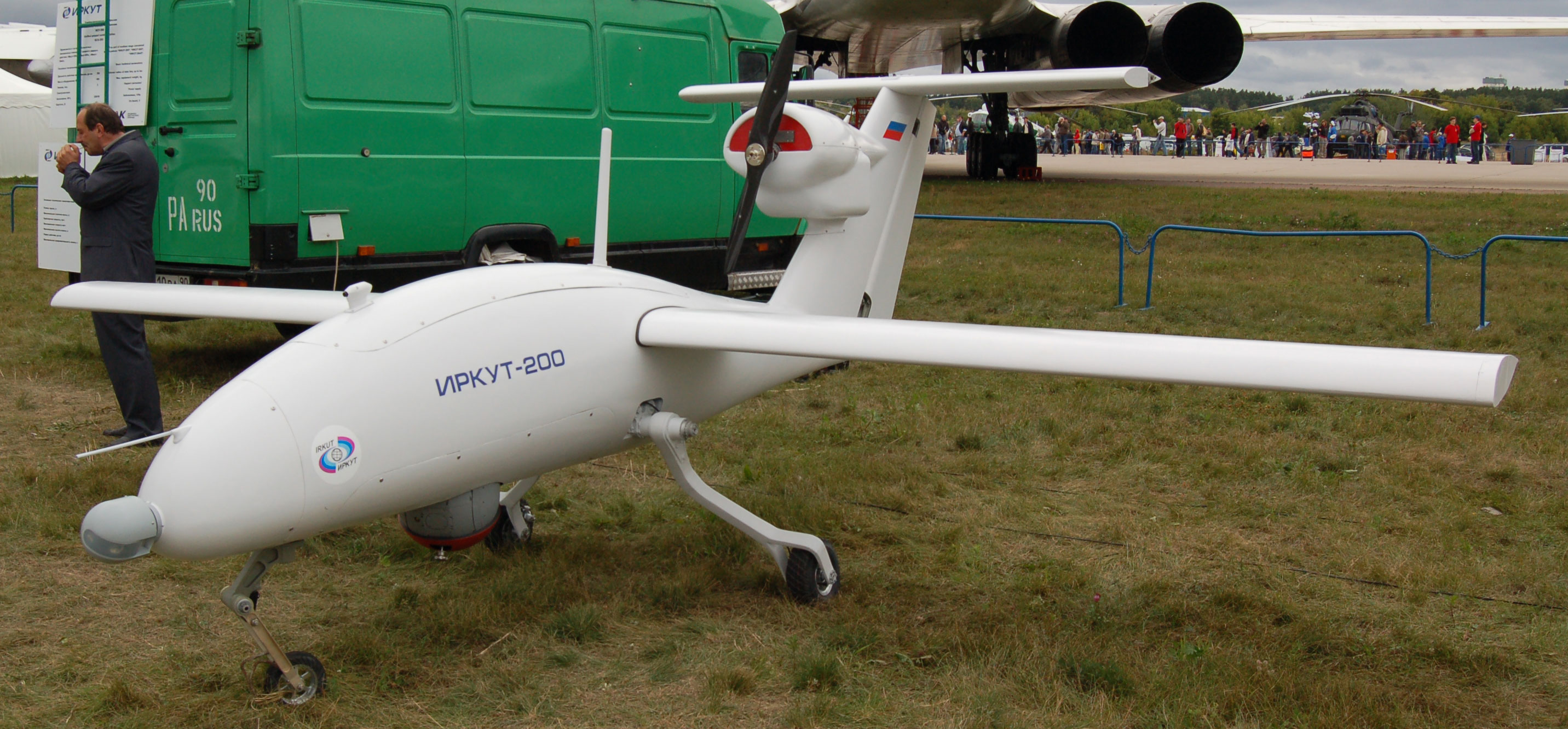 БПЛА Иркут-200 на авиасалоне МАКС-2009